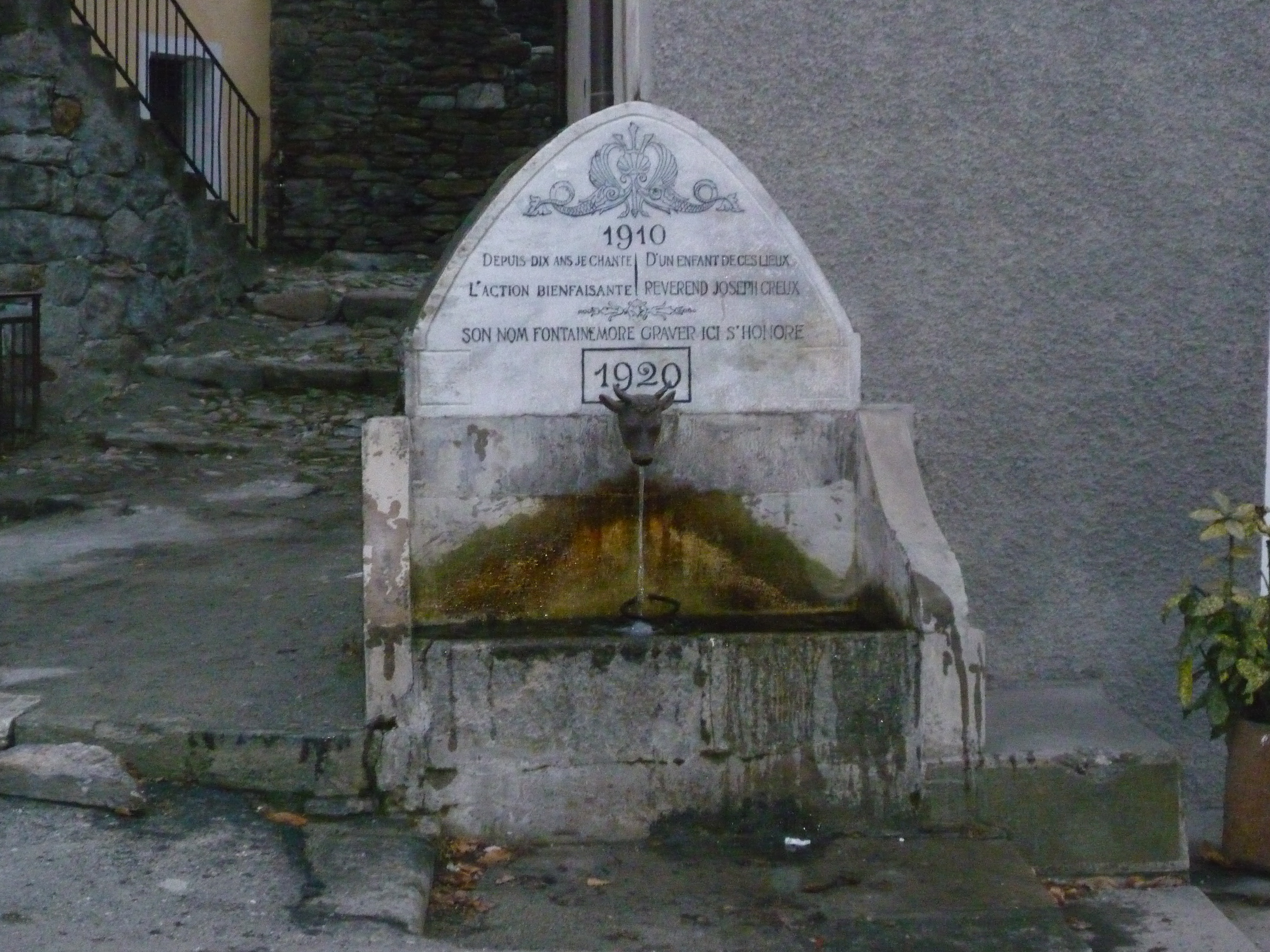 Fontaine à Fontainemore - (Vallée d'Aoste, Italie)